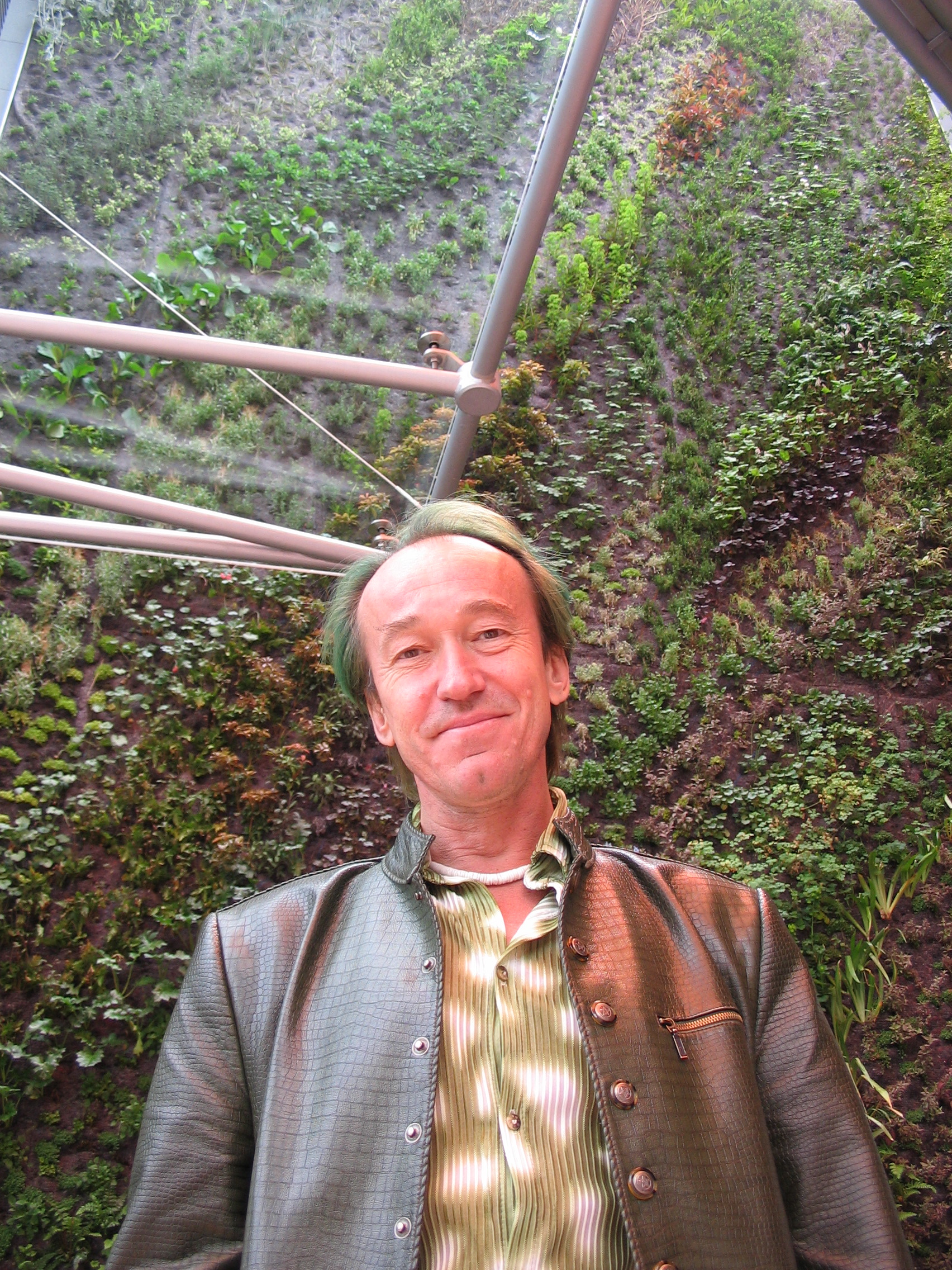 Jardin vertical de Patrick Blanc. Inauguration du Dôme, le nouvel espace de restauration et de loisirs du centre commercial des 4 Temps, à La Défense (Puteaux), dans les Hauts-de-Seine.